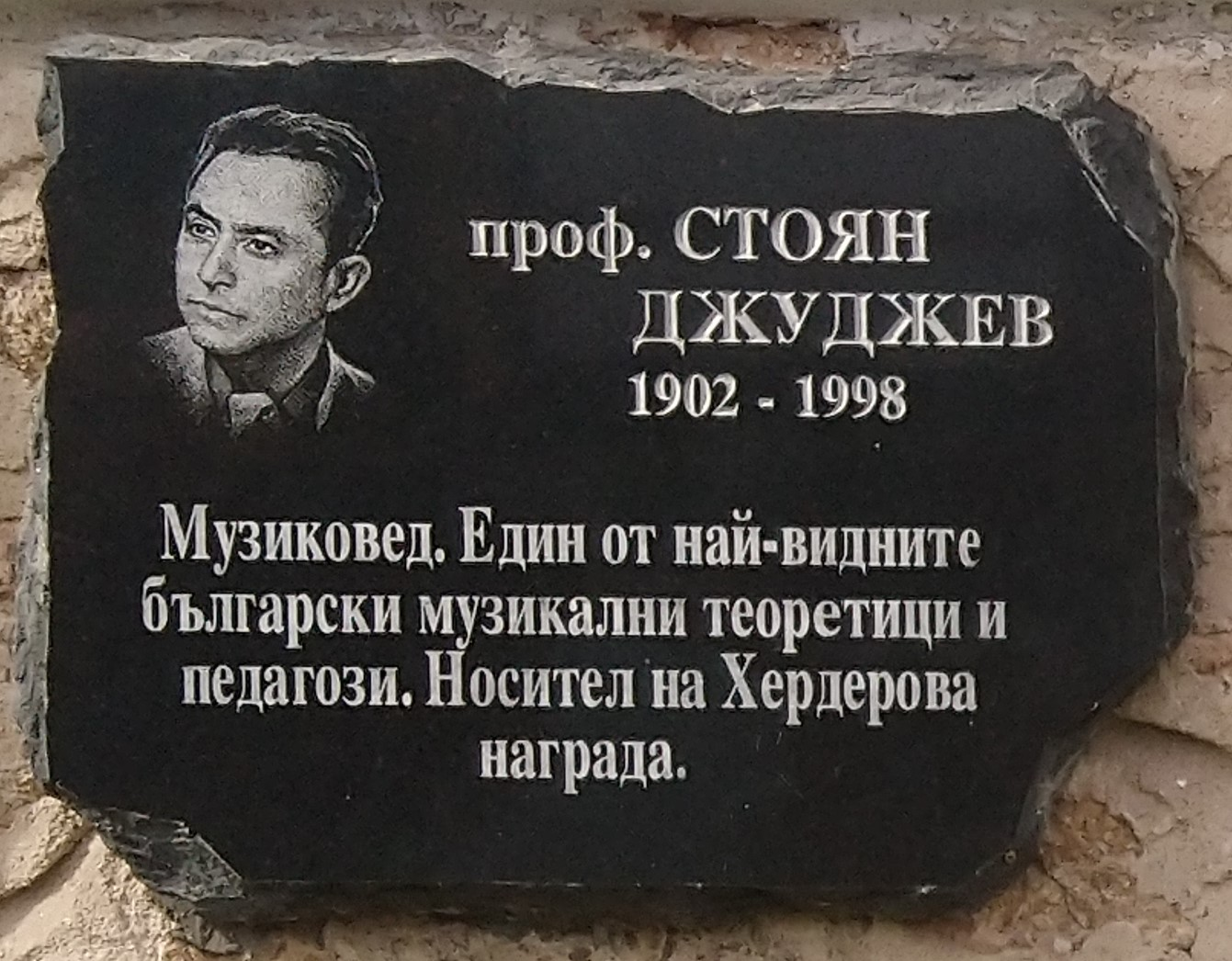 проф. Стоян Джуджев (1902 - 1998) - плоча в Исторически музей Панагюрище - Надпис: Музиковед. Един от най-видните български музикални теоретици и педагози. Носител на Хердерова награда.